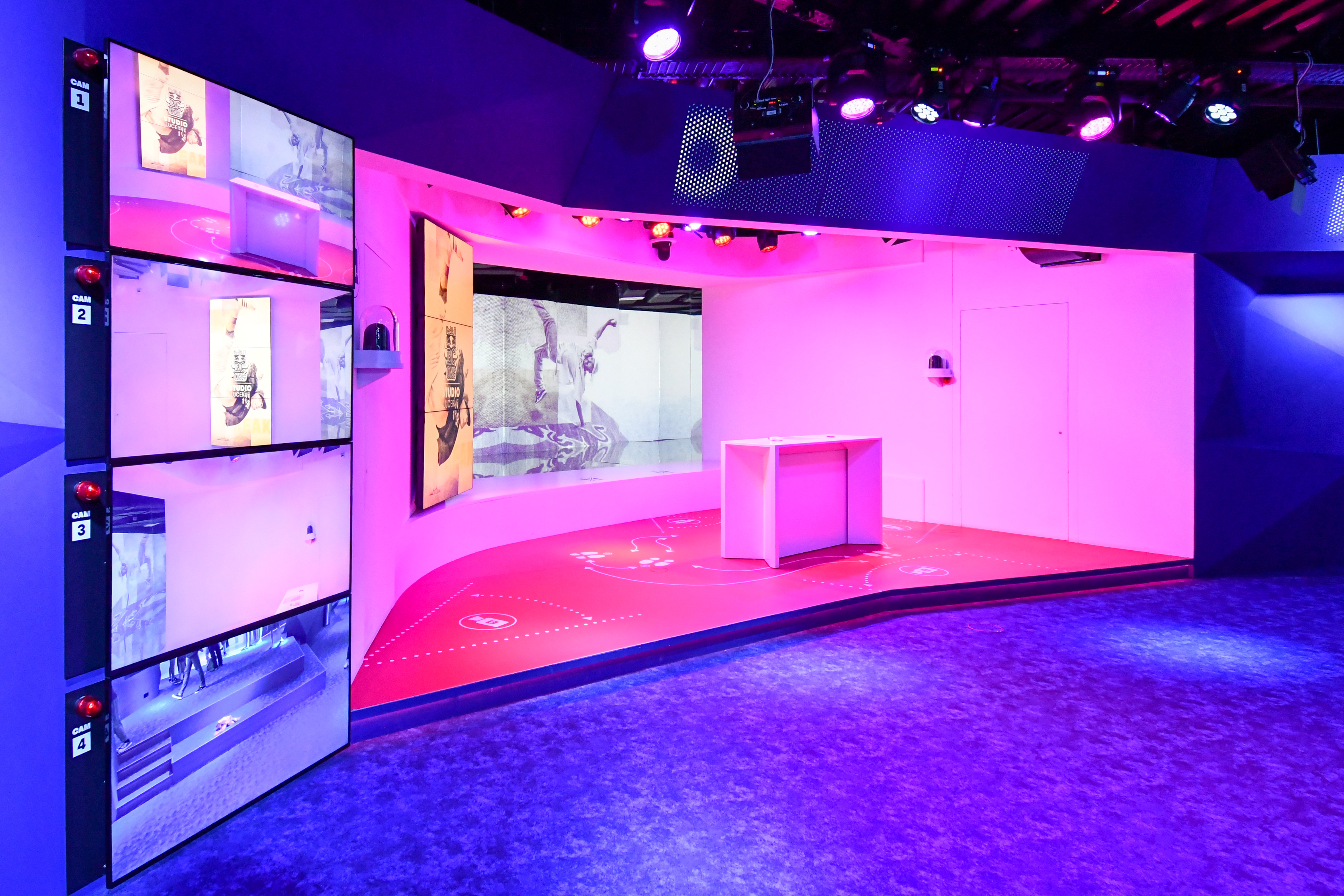 Das TV-Studio in der Media World im Verkehrshaus Luzern.